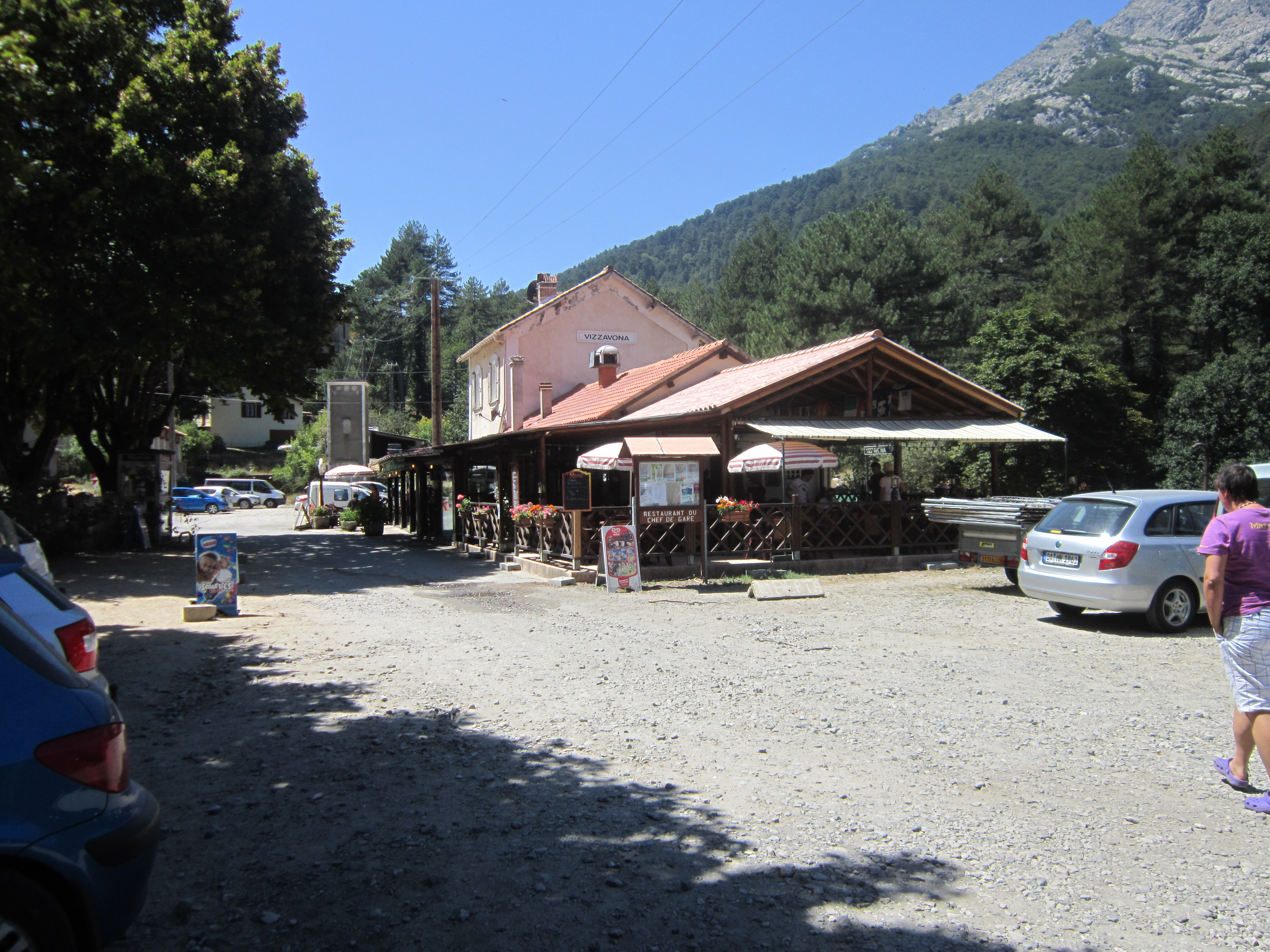 Gare de Vizzavona (910 m): zone bivouac pour les randonneurs du GR20